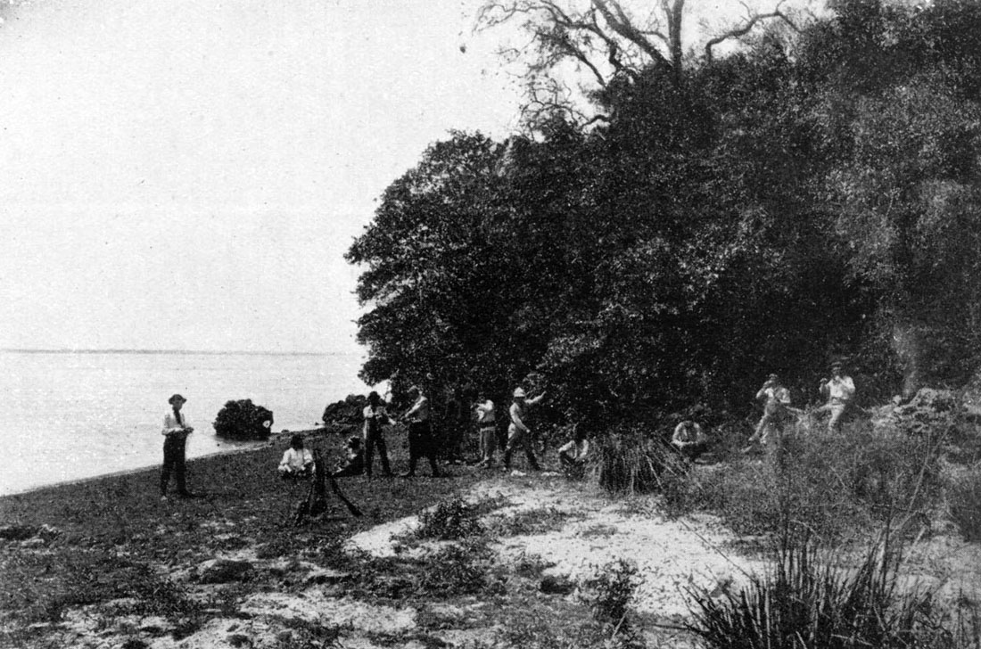 Excursion Científica por los ríos Paraguay, Alto Paraná e Iguazú, en 1892